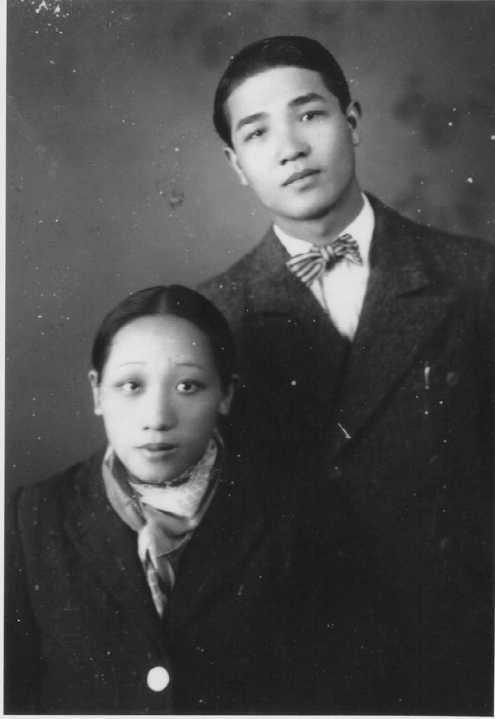 前往滿州國的鍾理和與鍾台妹